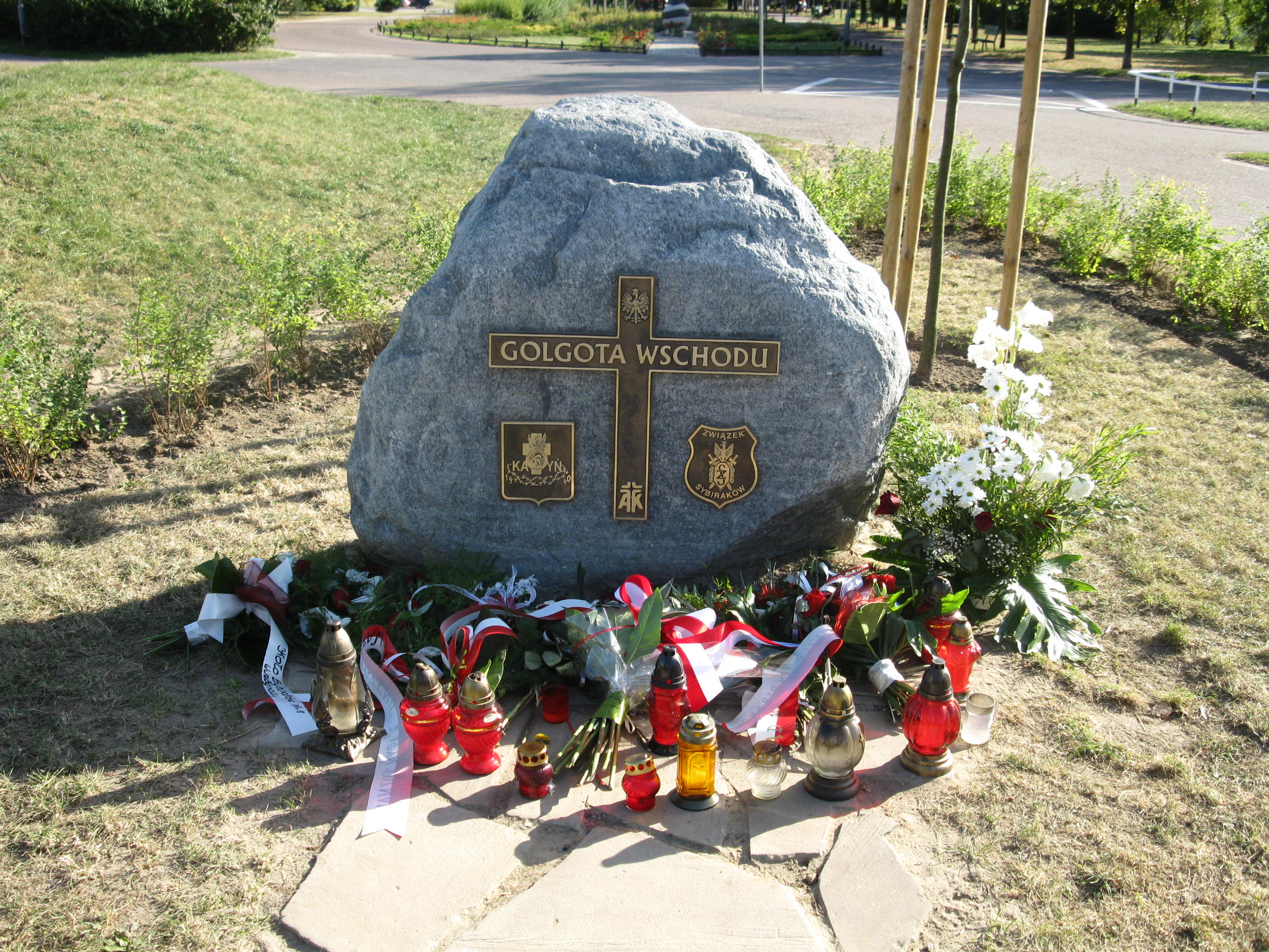 Pomnik Golgota Wschodu na osiedlu Wichrowe Wzgórze w Poznaniu, stojący w otoczeniu trzech Dębów Pamięci.